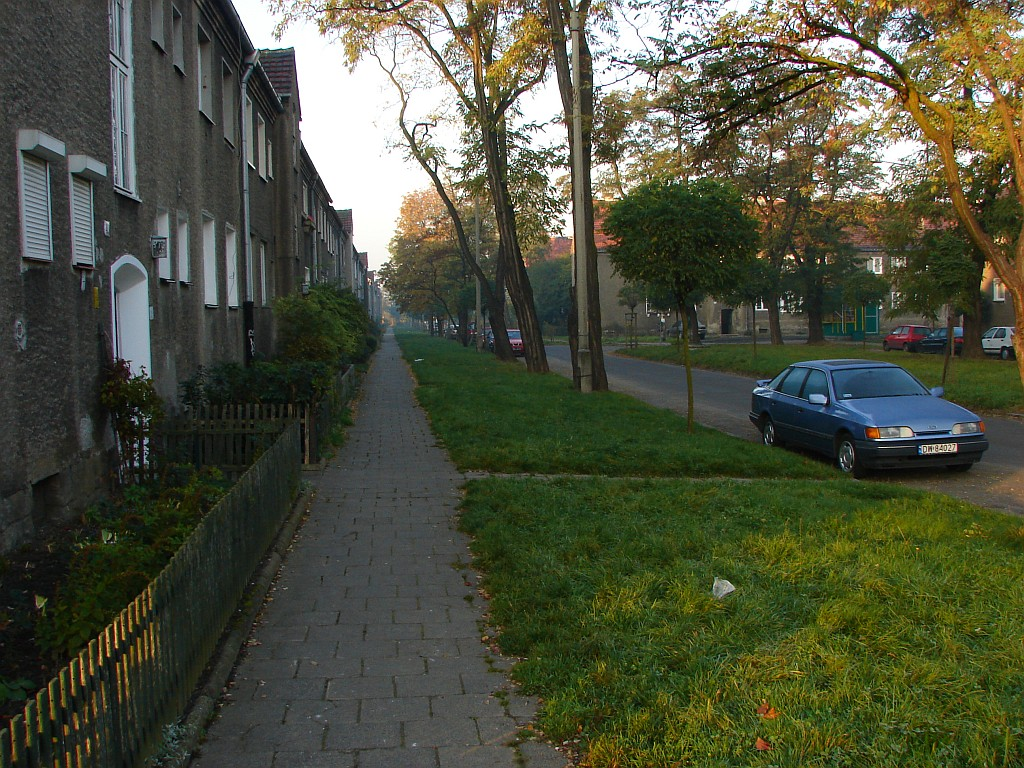 Osiedle przy ul. mjr Jana Piwnika-Ponurego we Wrocławiu